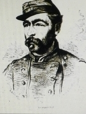 Dessin d'Ignace Hoff, 35 ans, en uniforme du 107e Régiment de ligne